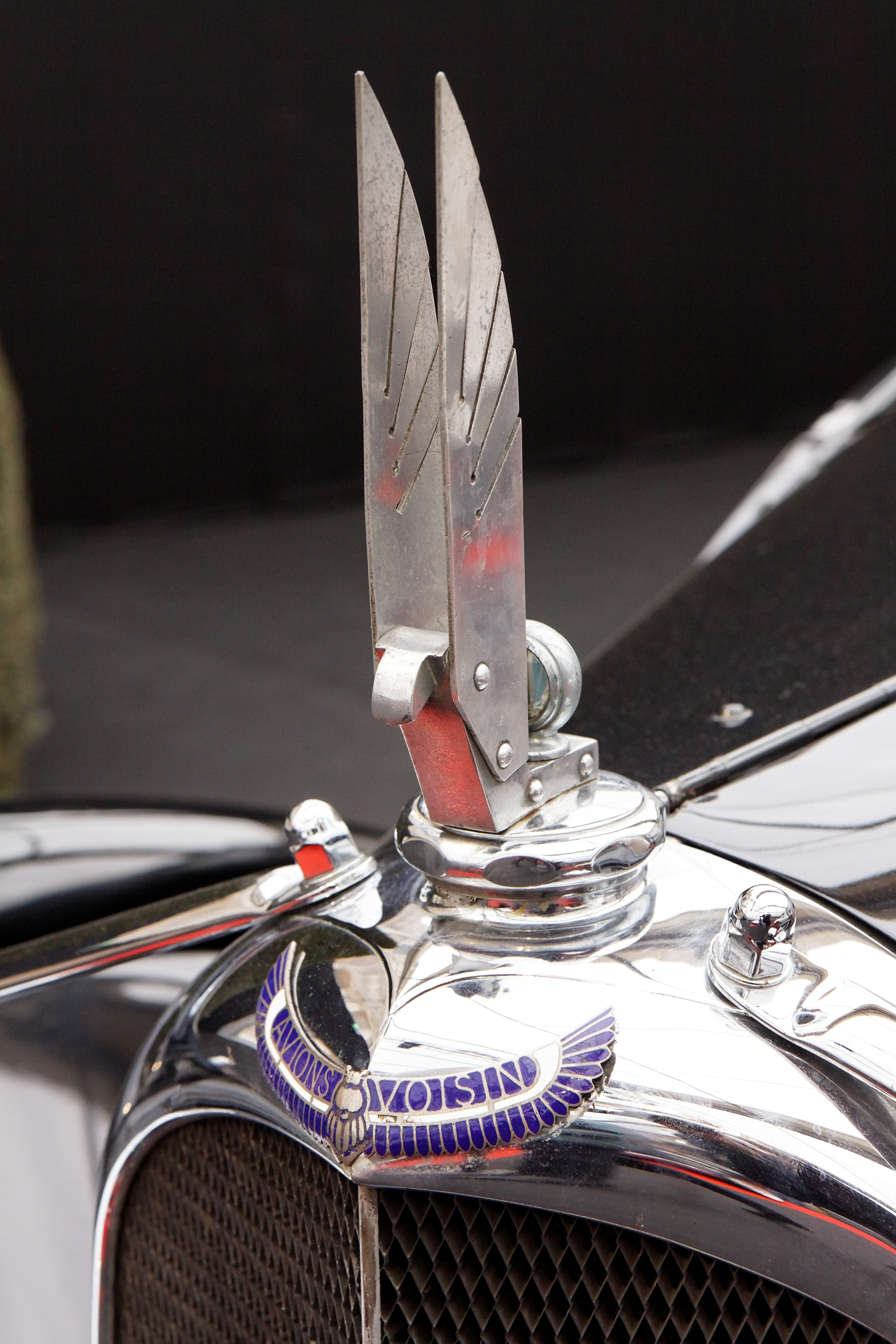 L'Avions Voisin C25 Cimier exposée devant le dôme des Invalides lors du festival automobile international 2011.